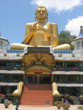 eigen foto